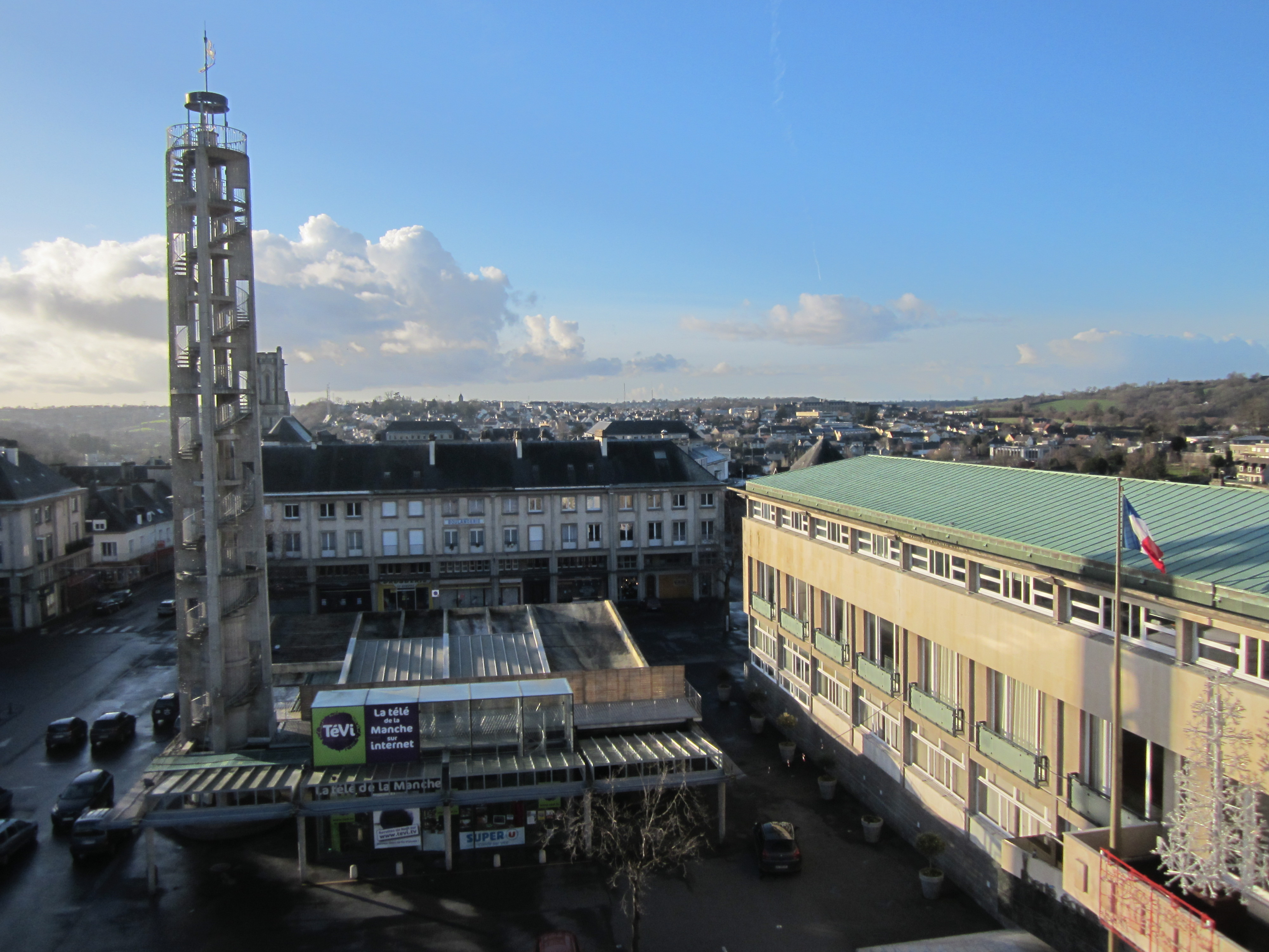 La grande roue s'est installé à Noël 2013 place de la Mairie